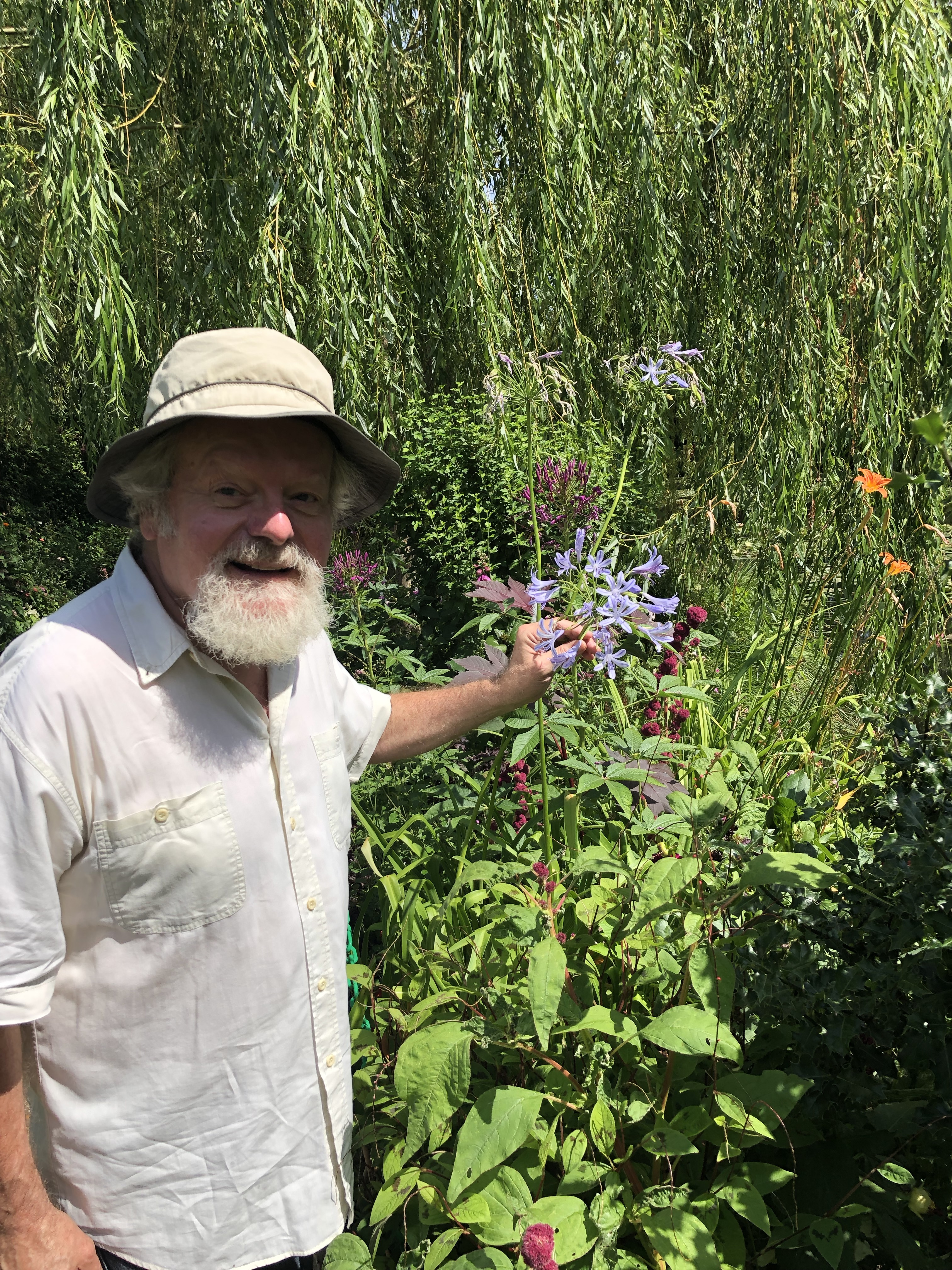 Prof. Jean-Marc Vanden-Broeck dans le jardin de Monnet à Giverny, juillet 2019. La photo prise et publiée avec la permission de Prof. Vanden-Broeck.